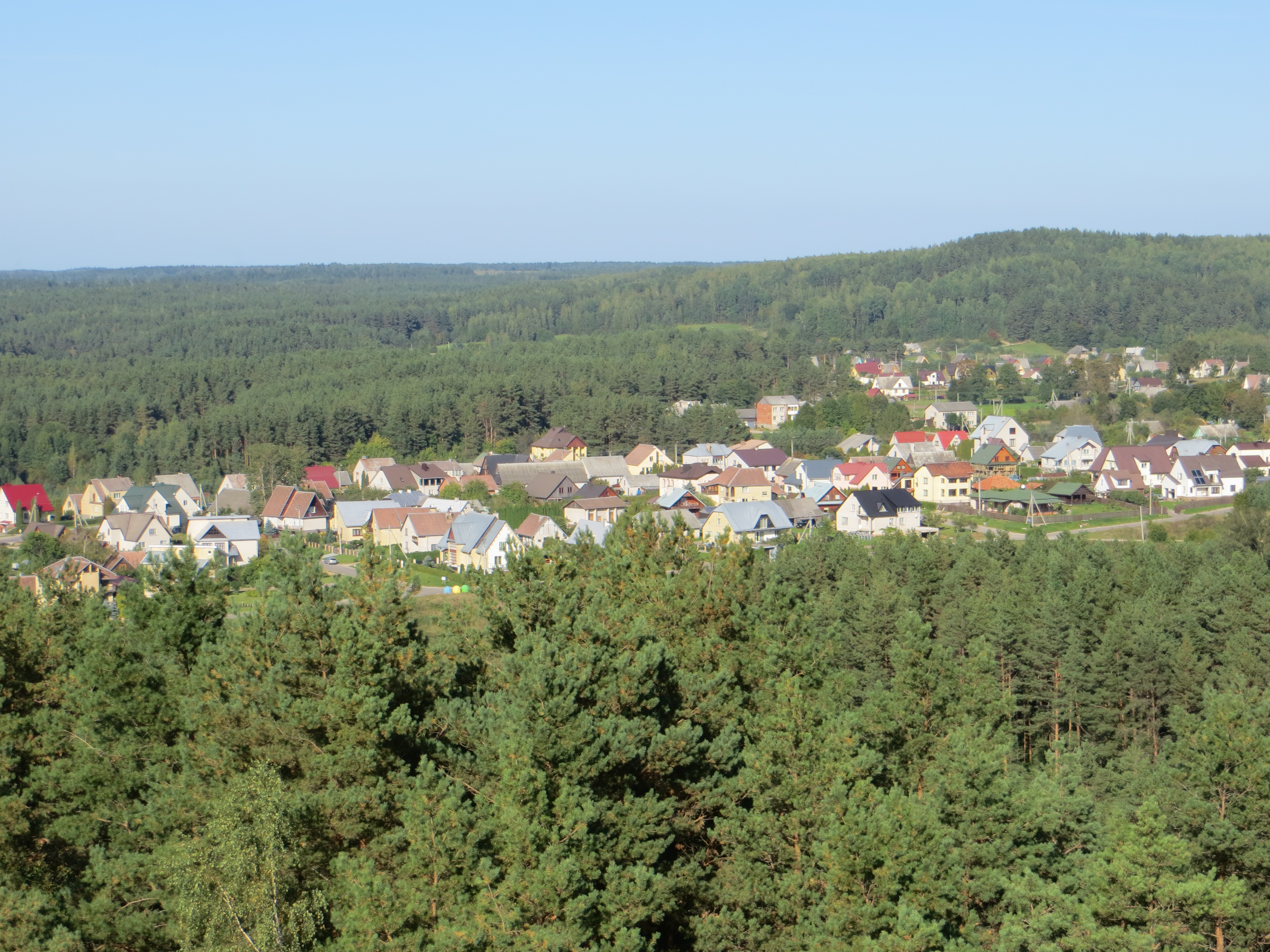 Ignalina, Lithuania